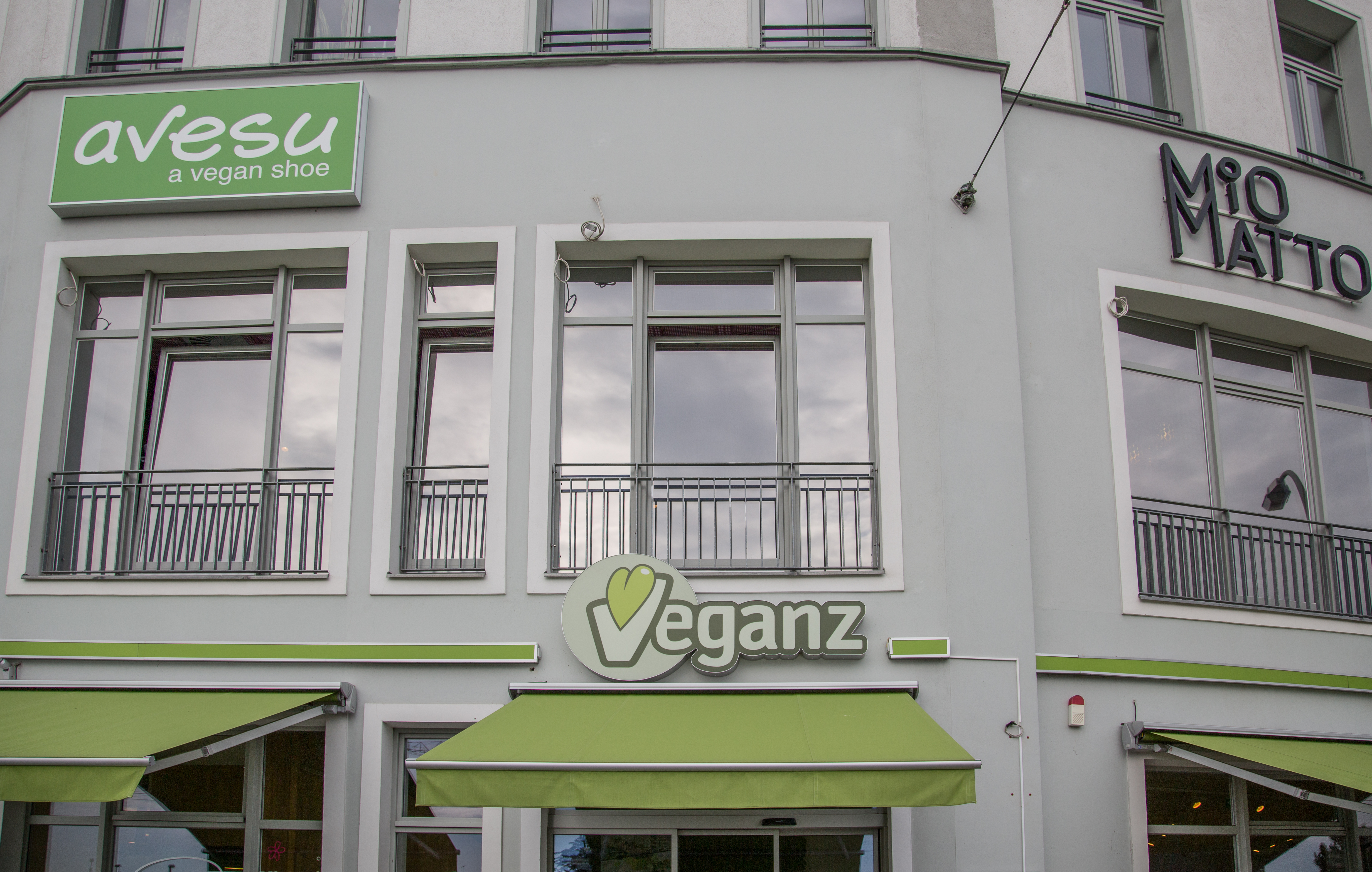 Friedrichshain, Berlin, Germany